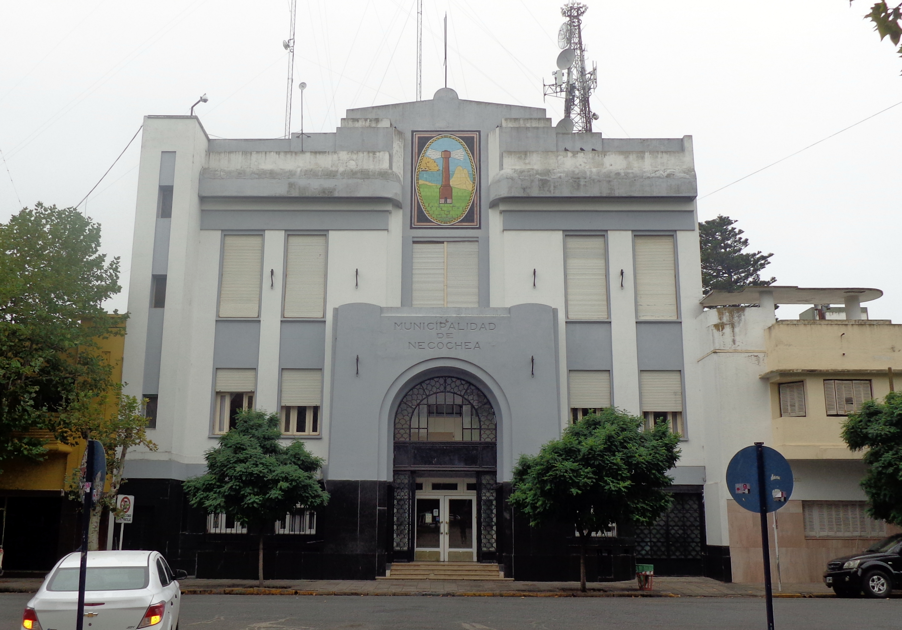 Municipalidad de Necochea, Provincia de Buenos Aires, Argentina.